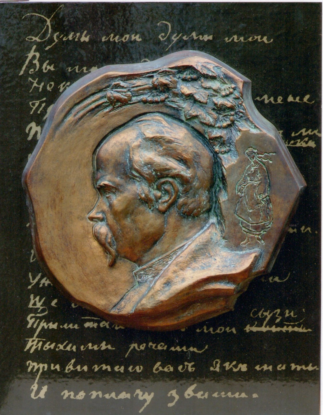 «Думи мої, думи мої …»Т. Шевченко. Сватівський краєзнавчий музей, Сватівський район, Луганська область. 1996. Скульптор Таранченко В.О. Барельєф. Оргскло тон., ДСП. 48 х 48 х 8.